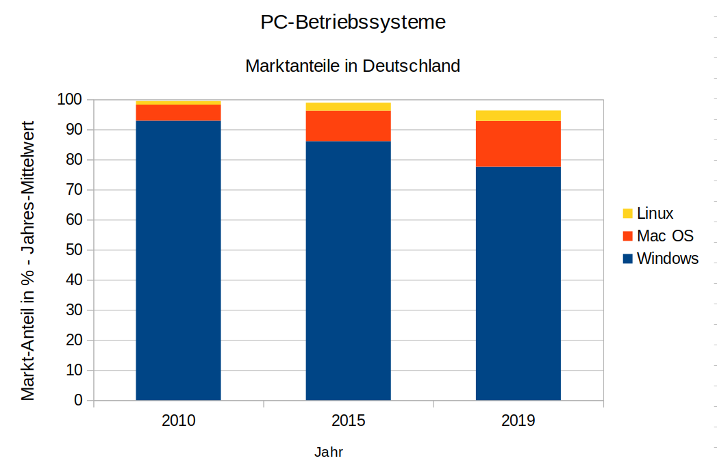 selbst erstellt nach Daten von (abgerufen am 02.02.2020)